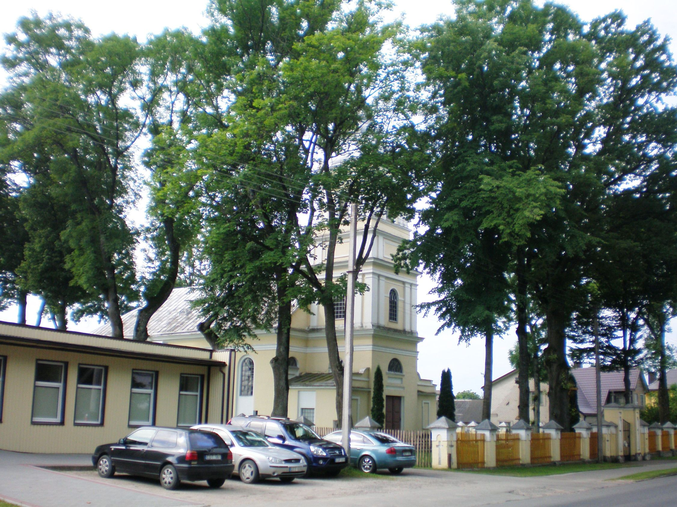 Veiveriai, Prienų raj.